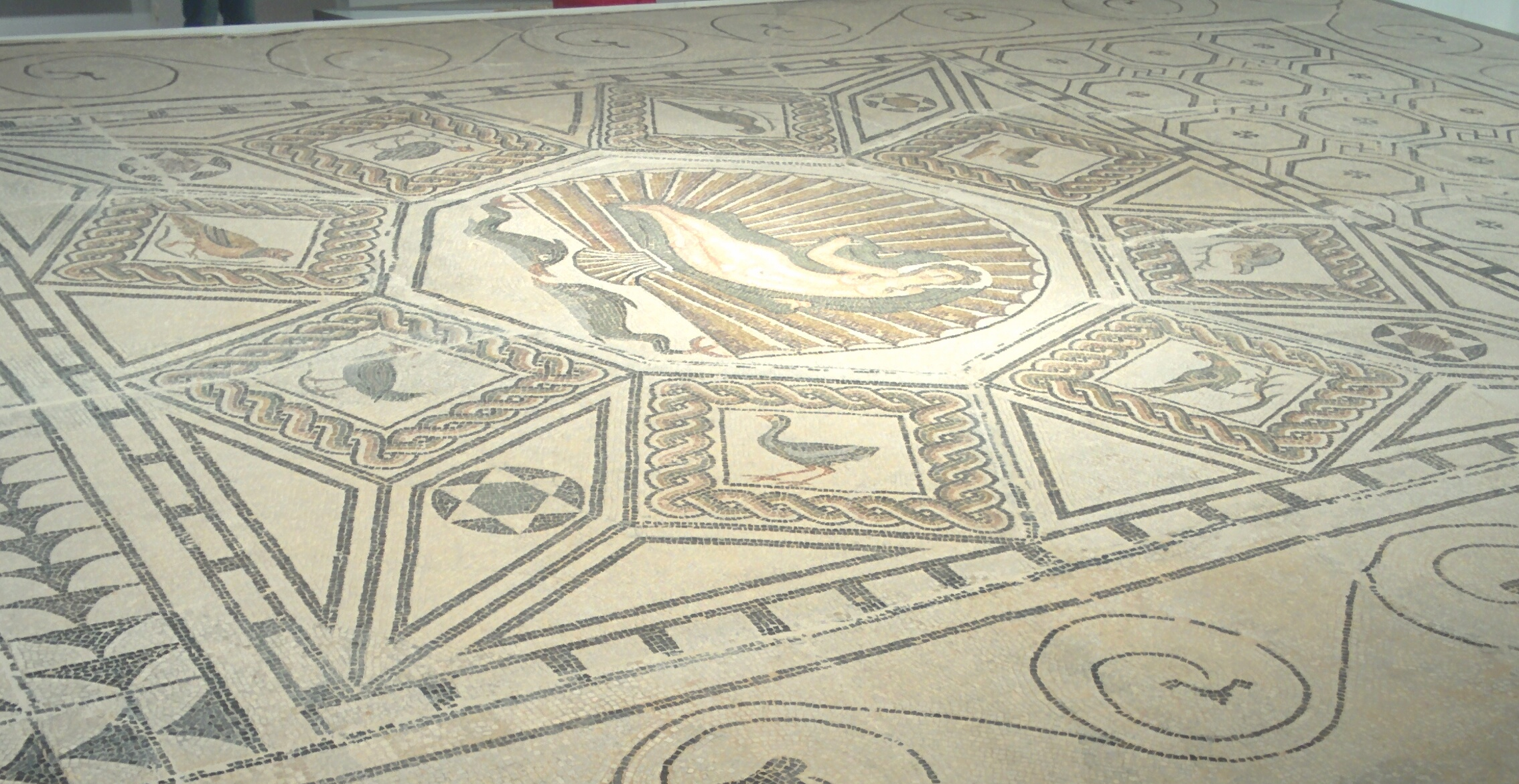 Mosaico Museo de Málaga 2